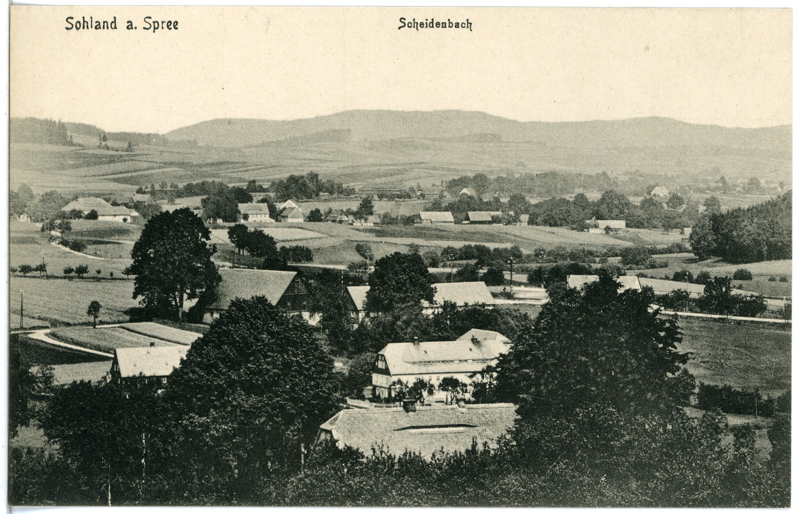 Sohland; Scheidenbach This postcard is from publisher Brück & Sohn in Meißen ( postcard has a unique number 19506 and is available in a higher resolution at the publisher. This images was uploaded in a cooperation project between Wikipedians and the publisher.